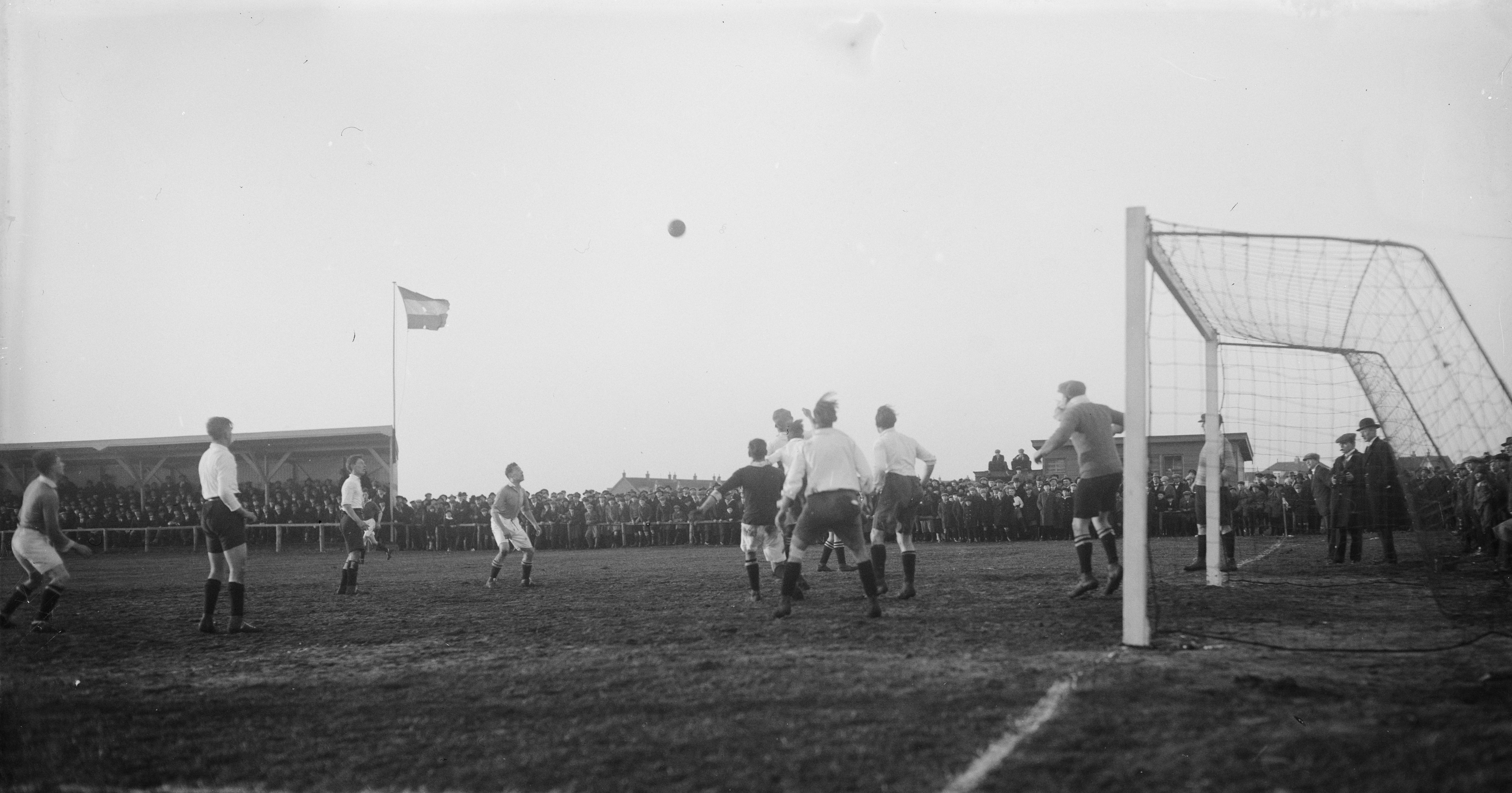 Voetbalwedstrijd, mogelijk op het sportterrein aan de Bolweg nabij Tuindorp, met veel publiek. Den Helder, 1925.